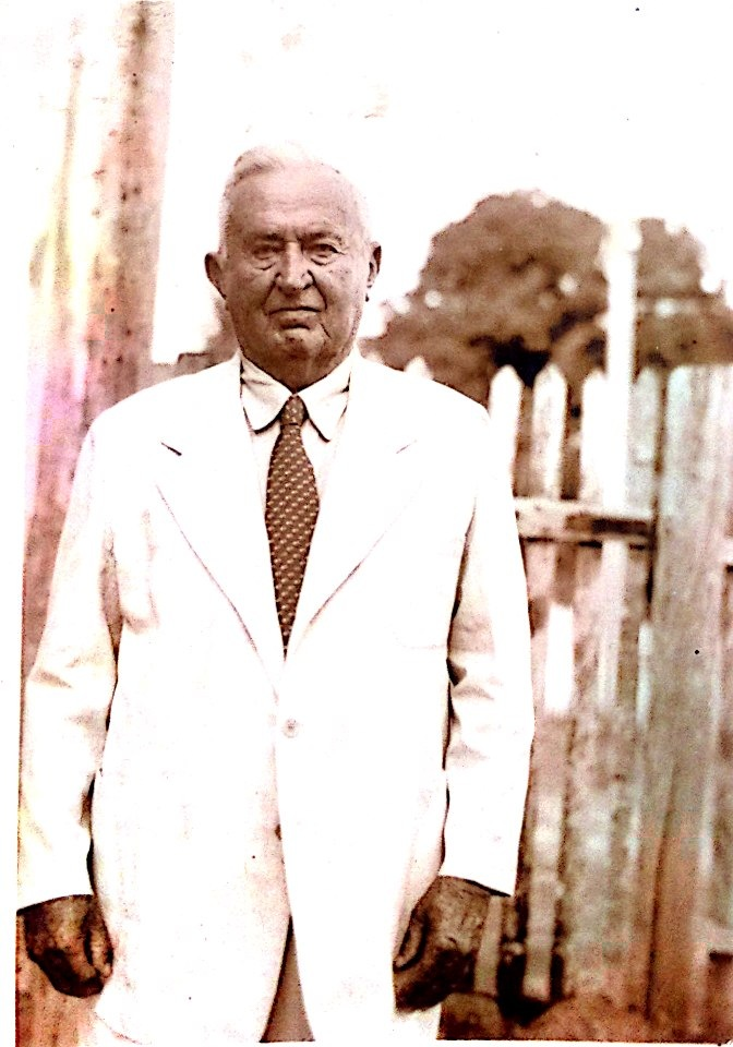 David Bowman Riker, natural de Charleston (Carolina do Sul, Estados Unidos da América), seringalista em Santarém. Foto da década de 1950.